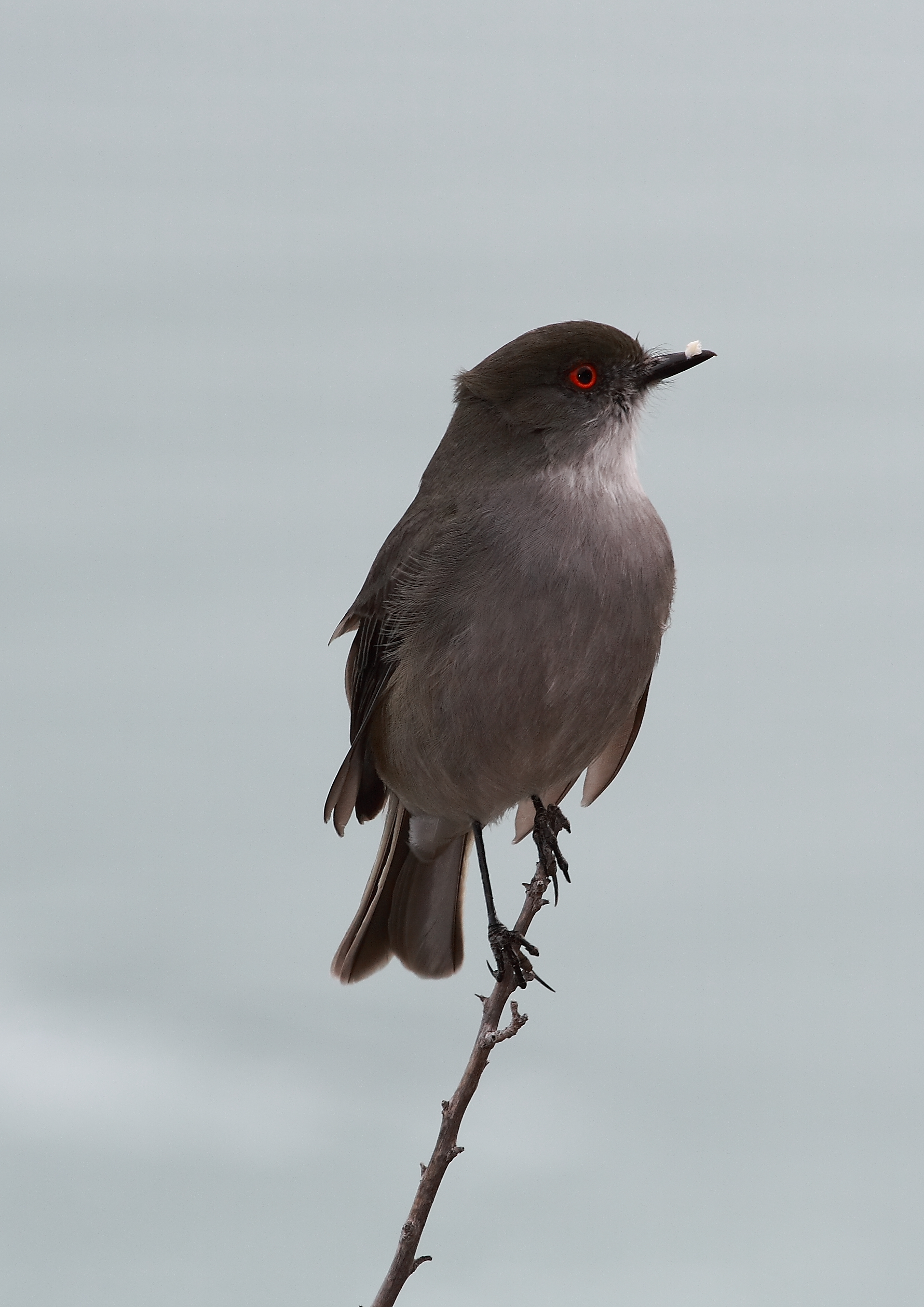 Fire-eyed Diucon (Xolmis pyrope) near Perito Moreno Glaciar, Santa Cruz, Argentina